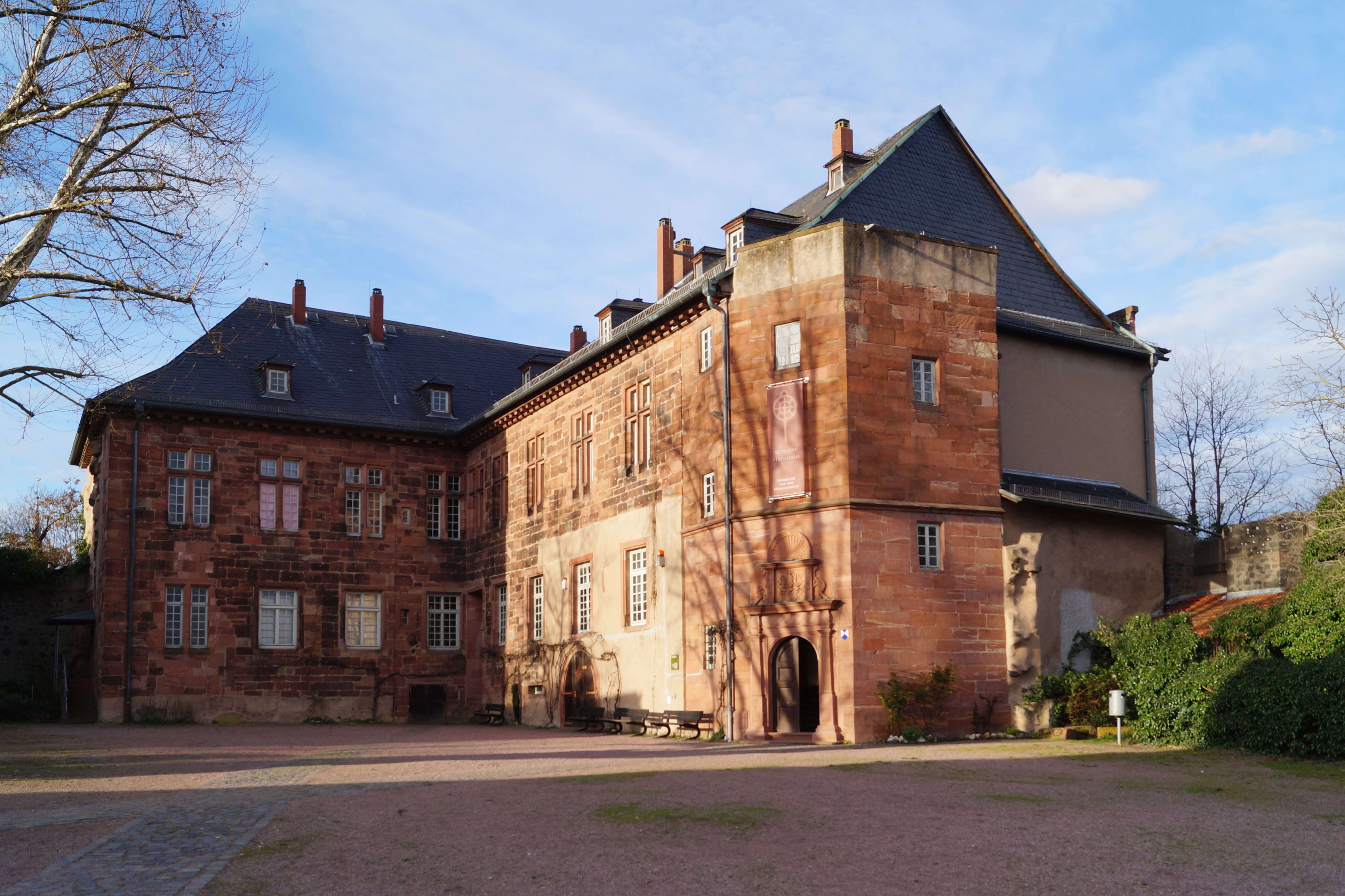 Schloss Steinheim, Ansicht des Hauptgebäudes vom Schlosshof (Ansicht von SW).